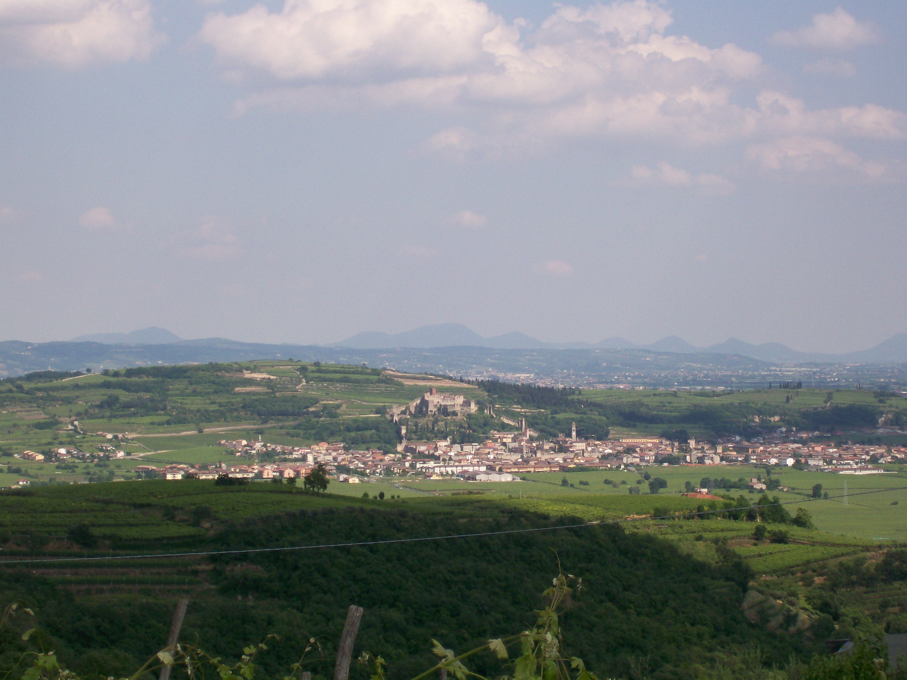 Veduta di Soave dalla zona di Monte di Colognola ai Colli.